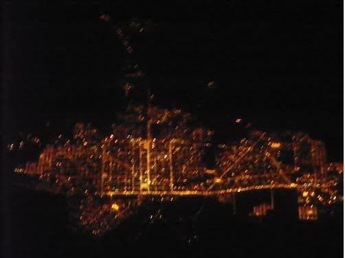 Vista nocturna de la ciudad de Tartagal desde un avión comercial.